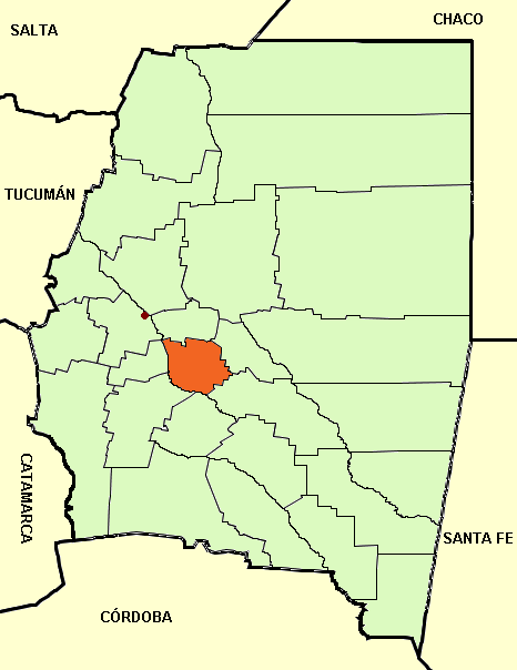 Mapa editado de: Santiago del Estero province (Argentina), departments and capital.png